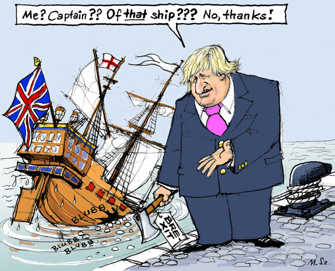 Boris Johnson möchte nicht Kapitän (Premierminister) eines Schiffes werden, das er gerade selbst versenkt hat.